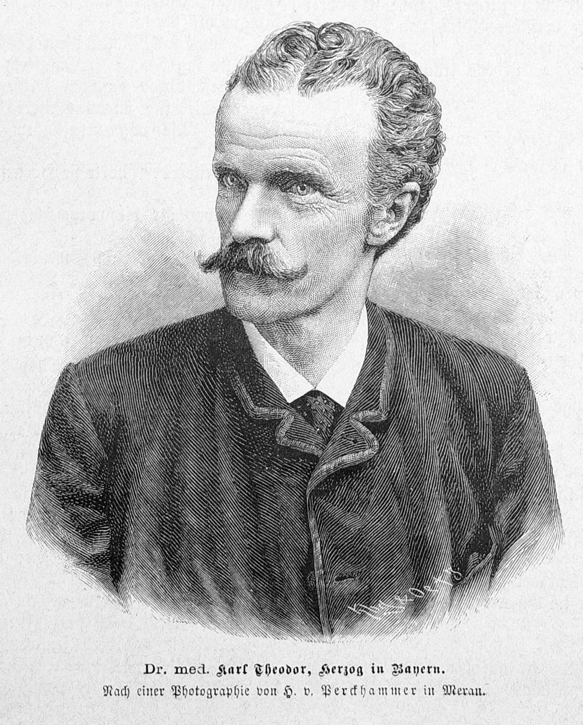 Bild aus Seite 053 in "Die Gartenlaube". Image from page 053 of journal Die Gartenlaube, 1887.